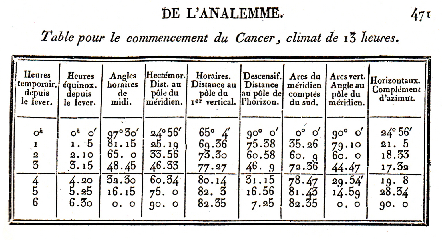 Table de Ptolémée corrigée par Delambre définissant la position du Soleil le jour du solstice d'été à la latitude de 16° 27' (climat de 13 heures) avec la déclinaison de 23°51' employée par Ptolémée.